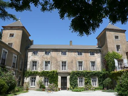 Le château de Pardailhan, à Pardailhan (Hérault)